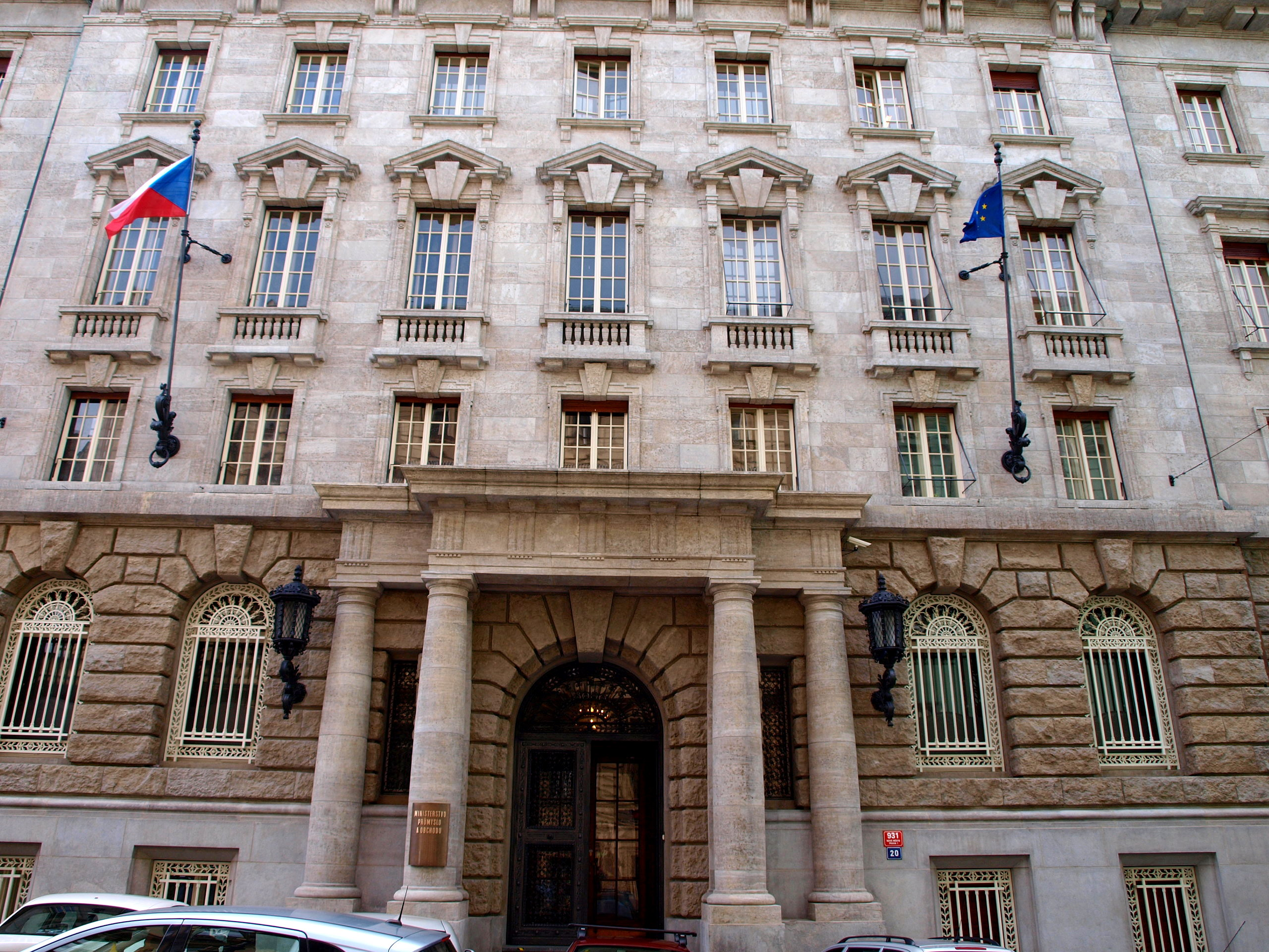 Petschkův palác